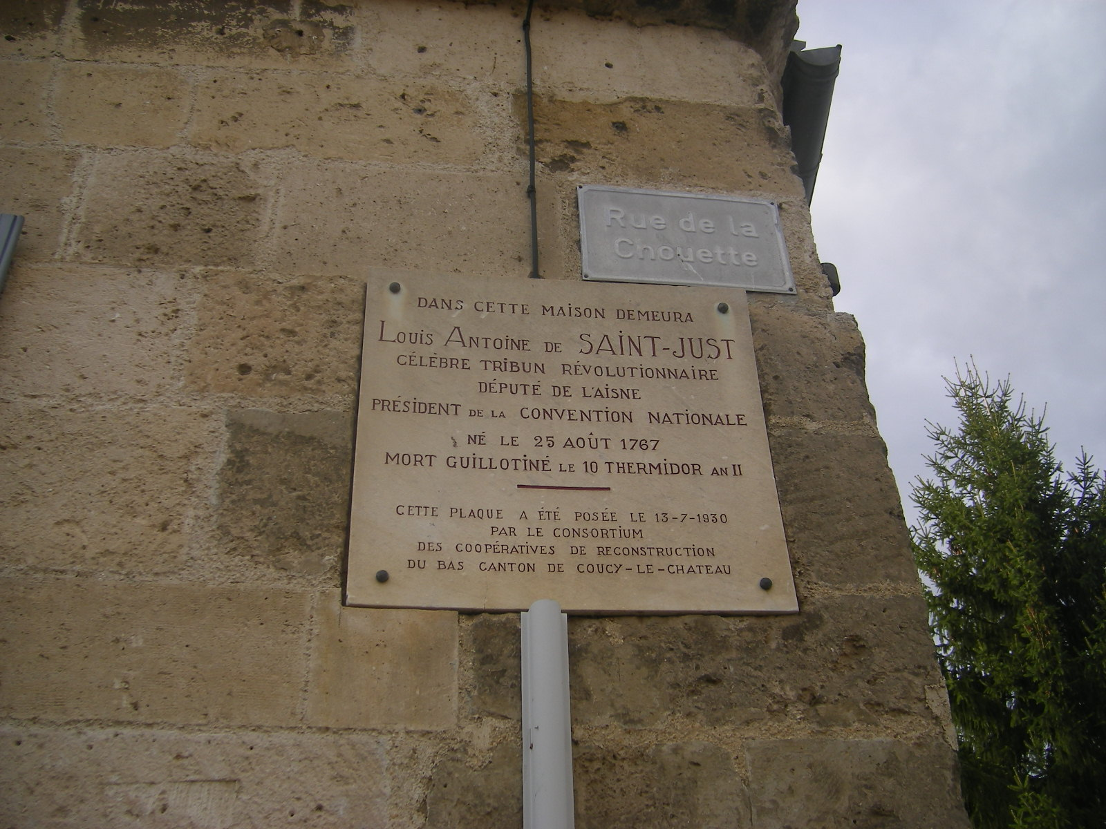 Blérancourt - Maison Saint-Just